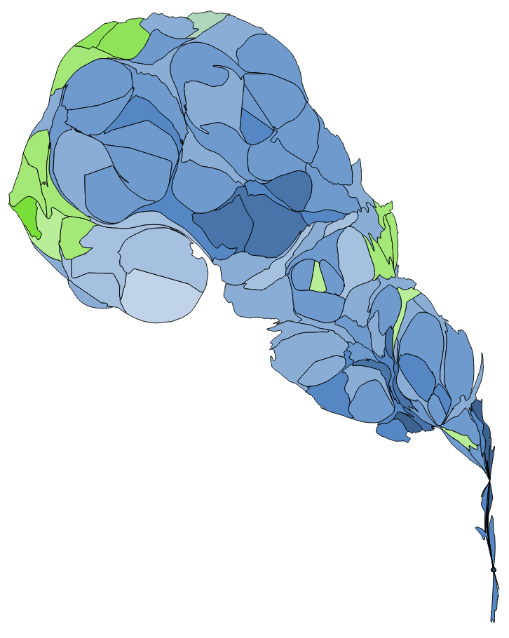 顏色對照表